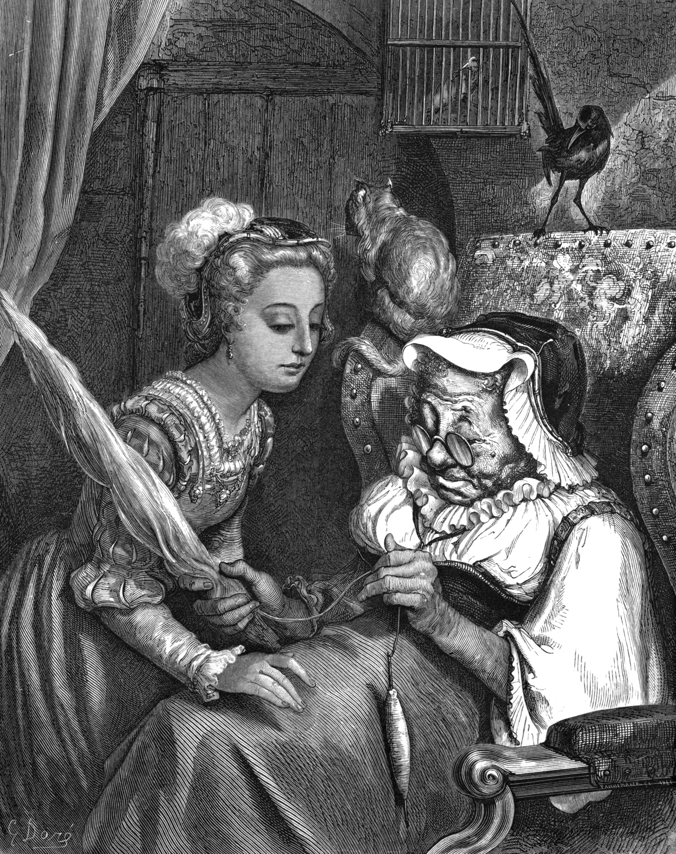 Illustration for Charles Perrault's La Belle au Bois Dormant from Histoires ou Contes du Temps passé: Les Contes de ma Mère l'Oye (1697). Gustave Doré's illustrations appear in an 1867 edition entitled Les Contes de Perrault. First of six engravings